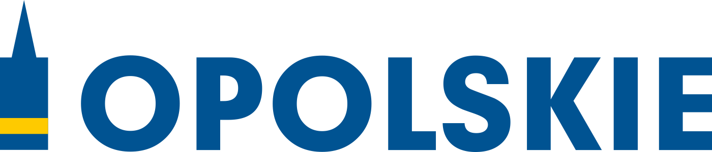 Logo der Woiwodschaft Oppeln